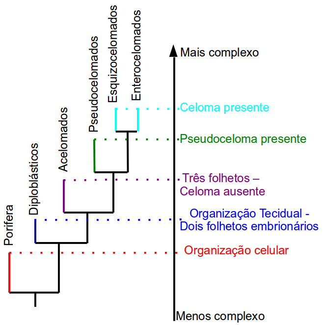 Esquema da Filogenia dos Metazoa a partir da interpretação das hipóteses tradicionais. Esquematiza a ideia tradicional de aumento de complexidade na história evolutiva do grupo, baseada na presença e organização da mesoderme.